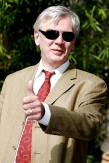 Le sénateur belge du Front national Michel Delacroix en avril 2008.